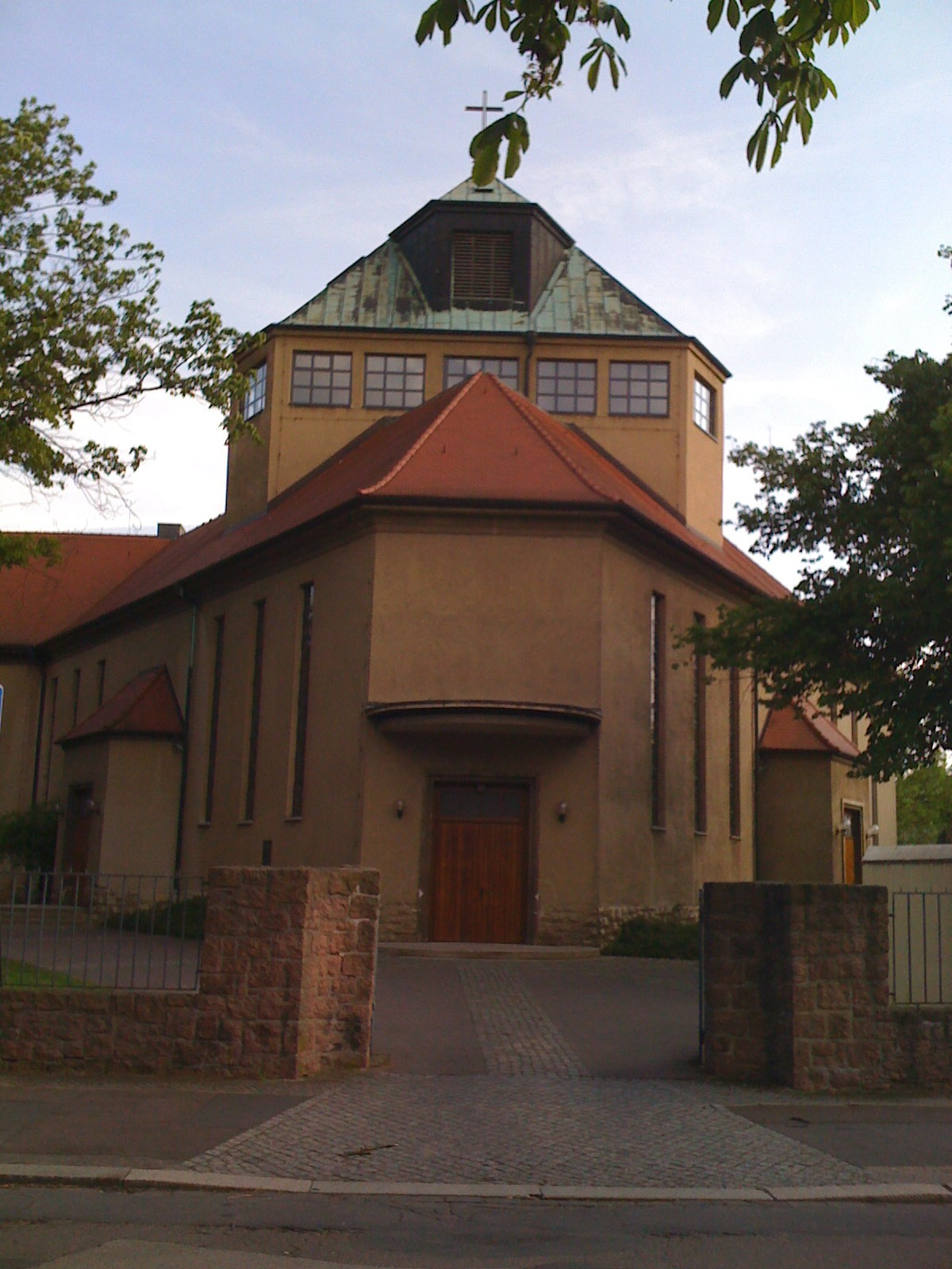 Dreieinigkeitskirche in Halle (Saale)